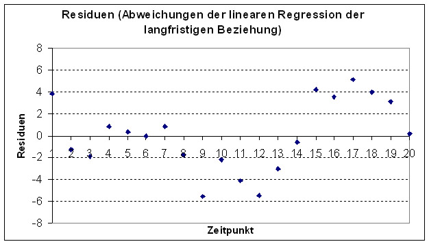 Fehlerkorrekturmodell, Residuen